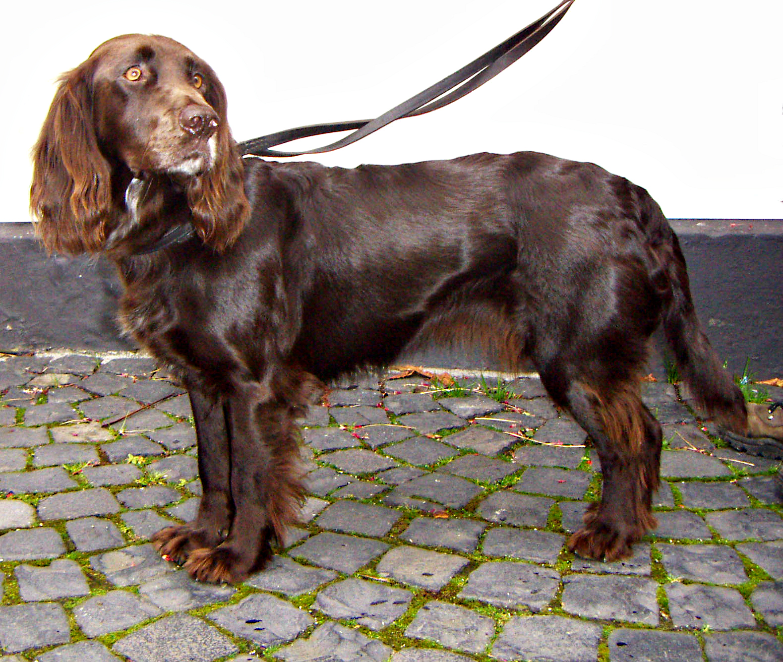 Deutscher Wachtel